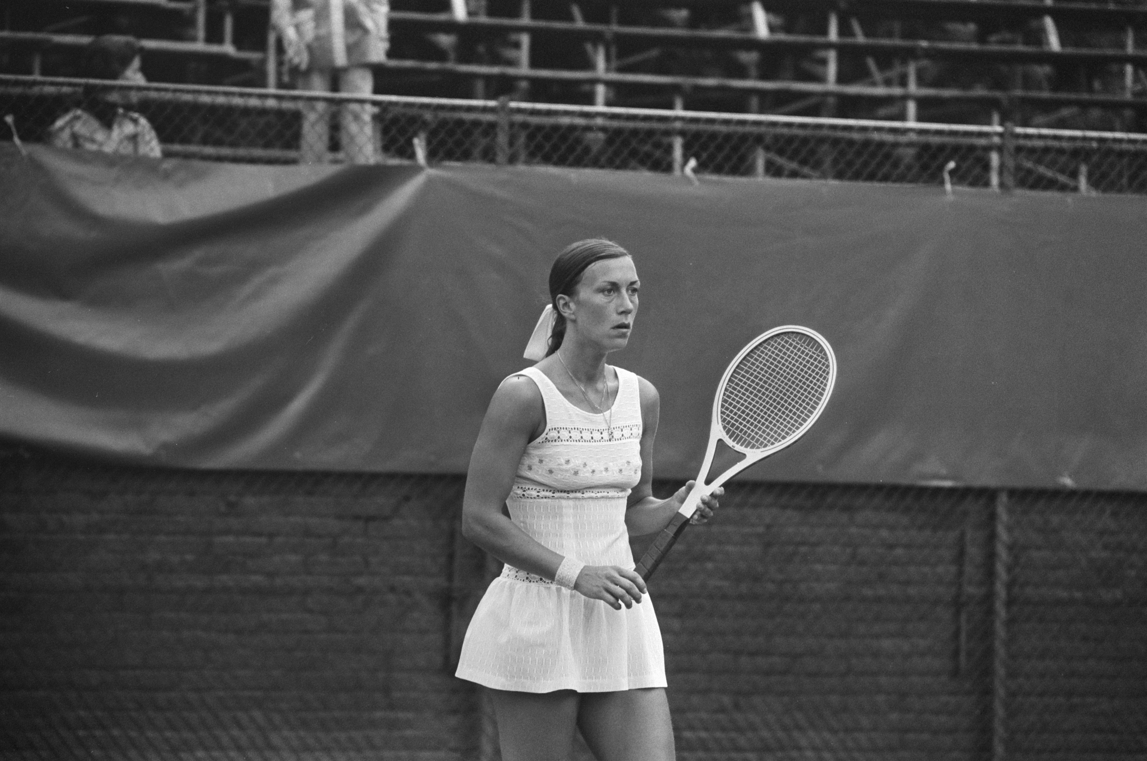 Collectie / Archief : Fotocollectie Anefo Reportage / Serie : [ onbekend ] Beschrijving : Internationale tenniskampioenschappen Melkhuisje; nr. 14, Ingrid Bentzer in actie, nr. 17 T. Zwaan en Ingrid Bentzer (r) Datum : 17 juli 1974 Trefwoorden : tennis Persoonsnaam : Zwaan, T Instellingsnaam : Melkhuisje, 't Fotograaf : Punt, […] / Anefo Auteursrechthebbende : Nationaal Archief Materiaalsoort : Negatief (zwart/wit) Nummer archiefinventaris : bekijk toegang 2.24.01.05 Bestanddeelnummer : 927-3332